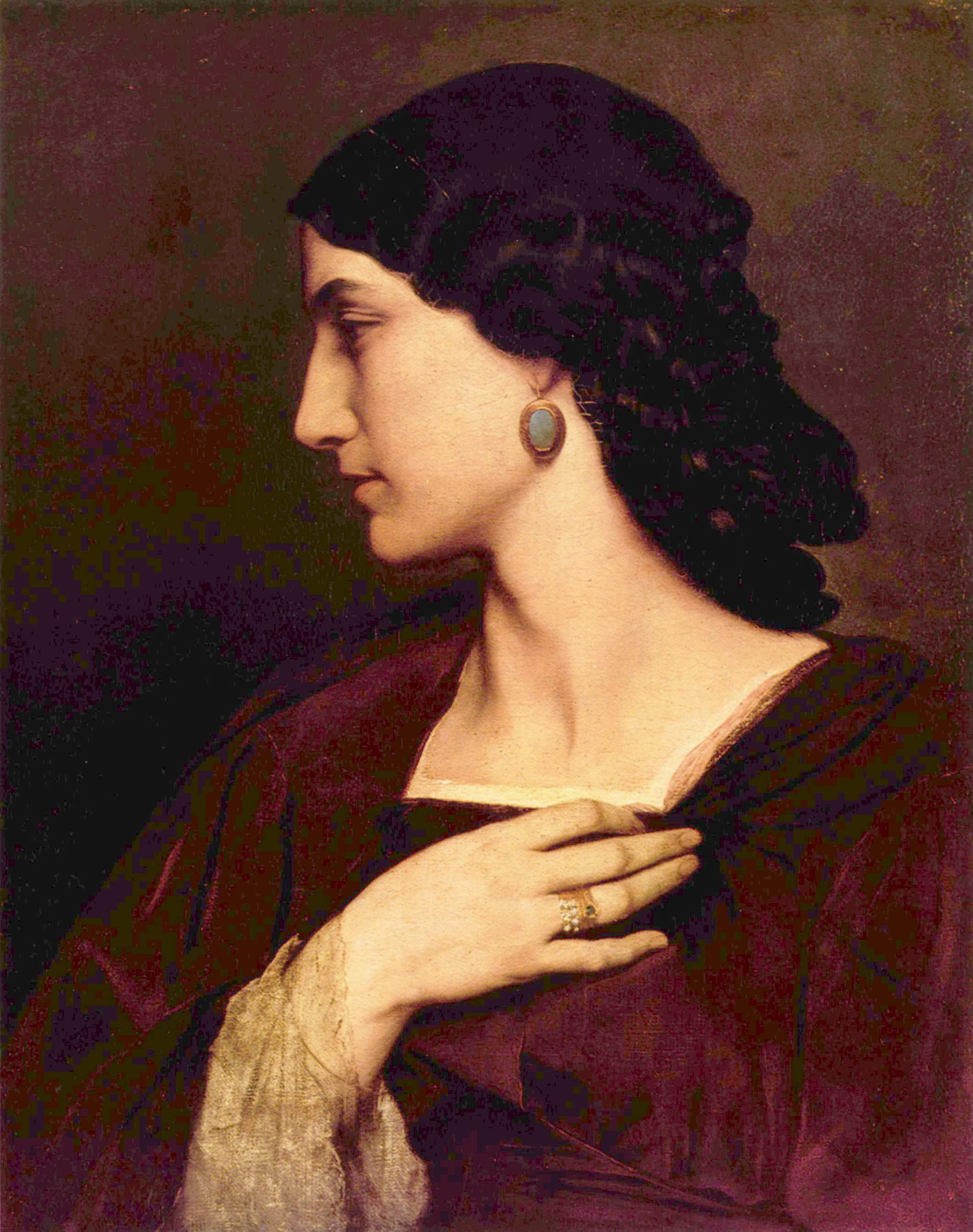 Die Römerin, die auch seine damalige Geliebte war, sitzt hier dem Maler Modell. Das Gesicht nach links gewendet ist von bezaubernder Schönheit und Anmut. Ihr ausgewählt eleganter Schmuck sowie die feine Kleidung und ihr sorgsam frisiertes Haar kennzeichnet sie als sehr wohlhabend - ein Gemälde, ganz im Geschmack der damaligen höheren Gesellschaft.